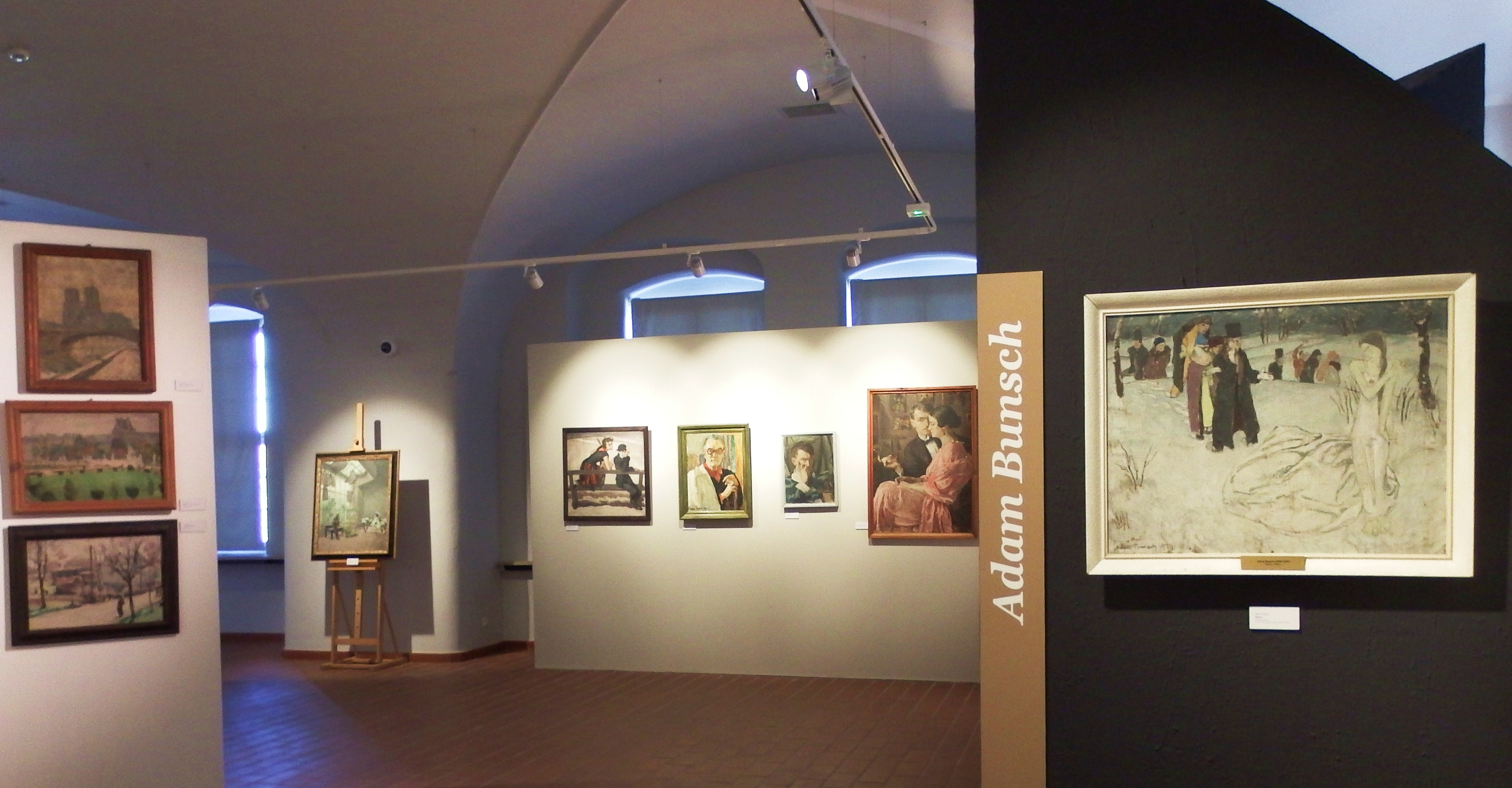 Wystawa Sygnowano Bunsch, Adam Bunsch